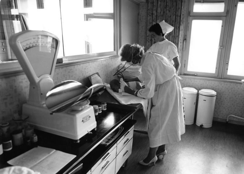 Städt. Krankenanstalten -Frauenklinik- Darmstadt Blick in den Säuglingsuntersuchungsraum